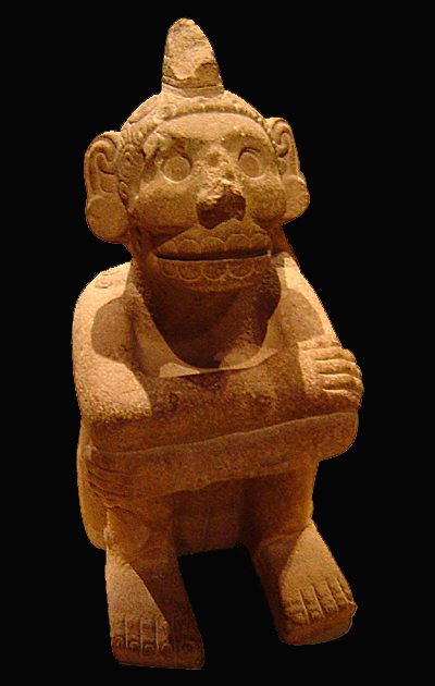 Statuette of Mictlantecuhtli, in the British Museum, London Estatueta de Mictlantecuhtli (também conhecido como Micli), no Museu Britânico em Londres